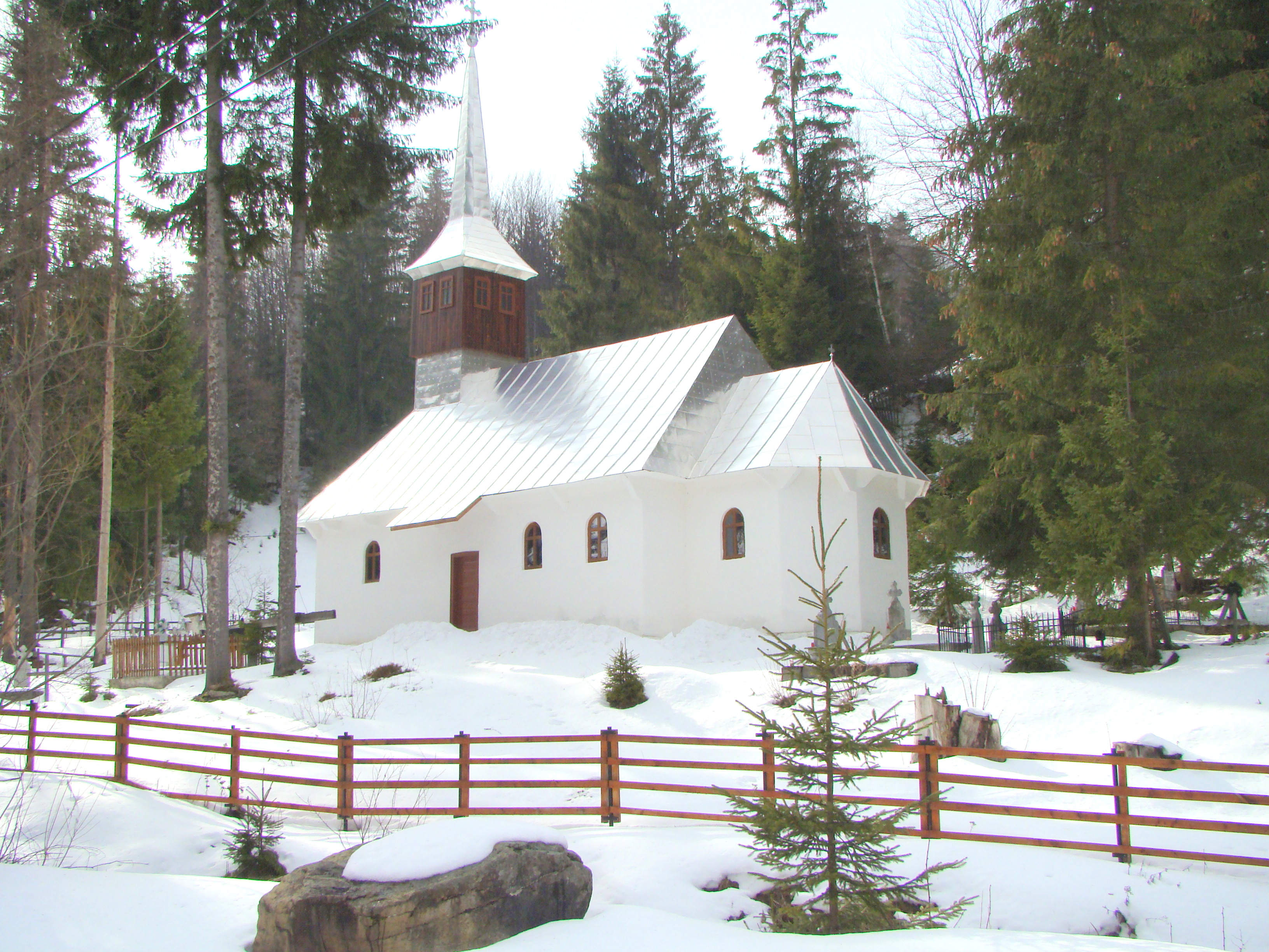 Biserica de Lemn din Biharia, jud. Alba, Romania